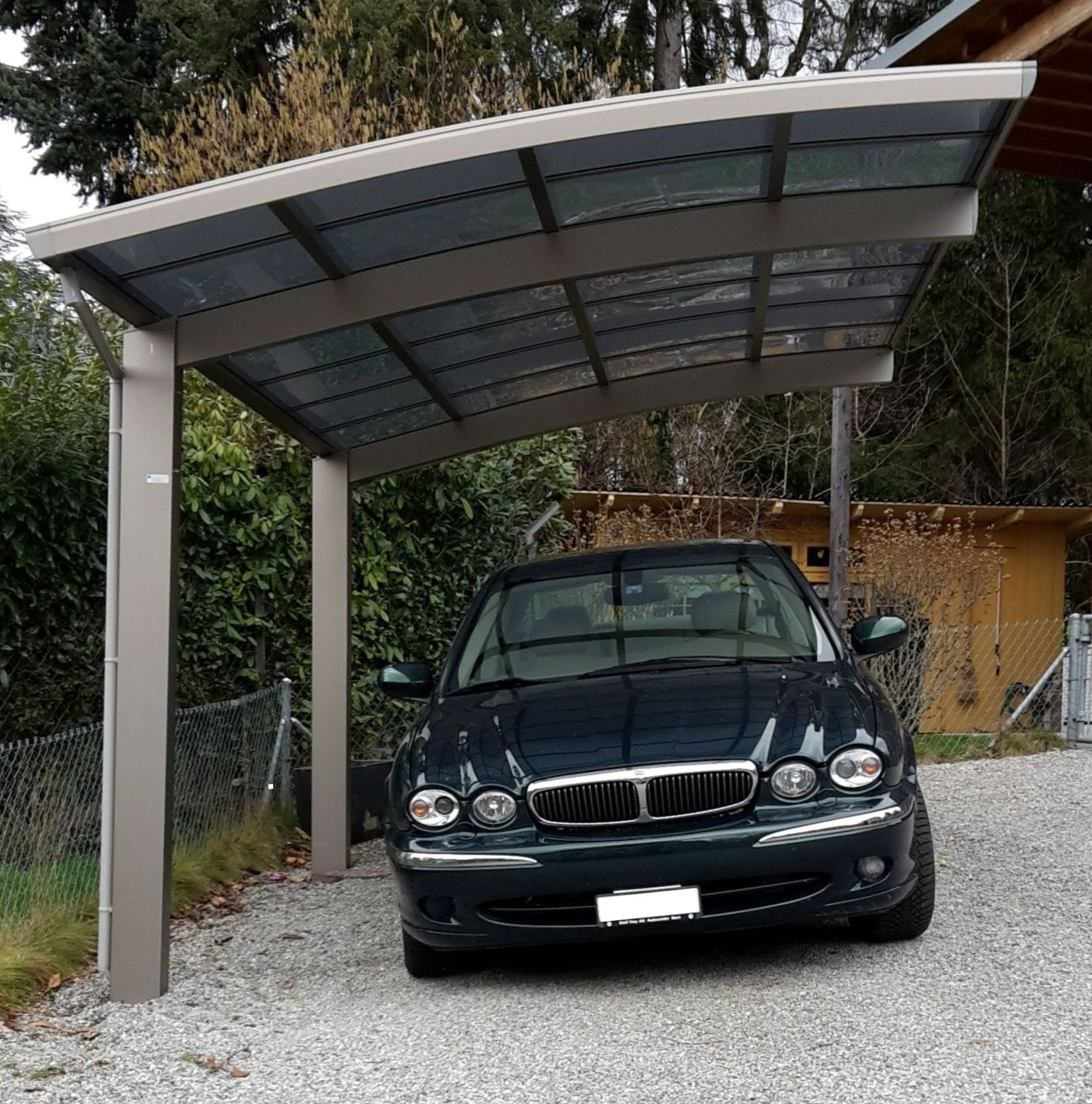 Carport für 1 PKW mit 2 Pfosten und auskragendem gewölbtem Dach